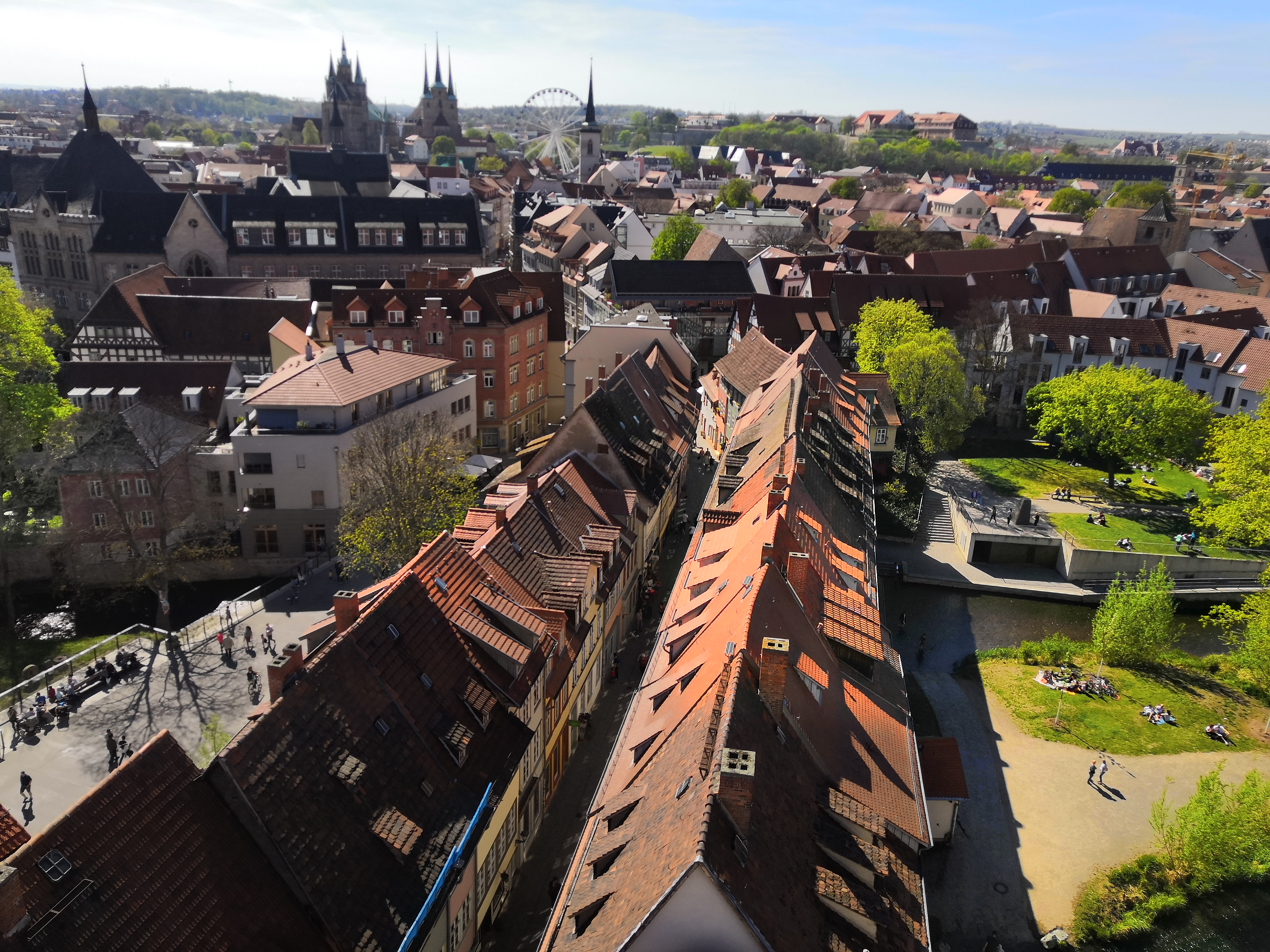 Blick vom Ägidienturm in Erfurt auf die Krämerbrücke